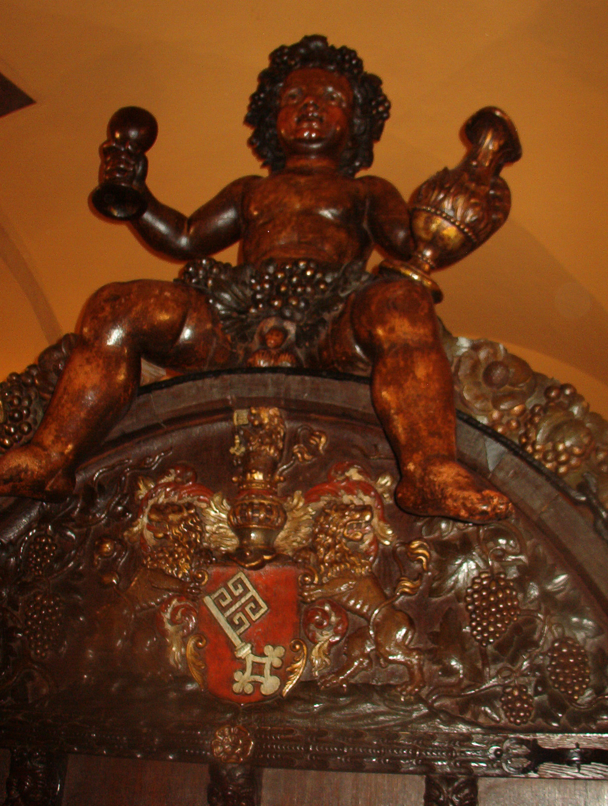 Bacchusfass im Bacchus-Keller des Bremer Rathskellers